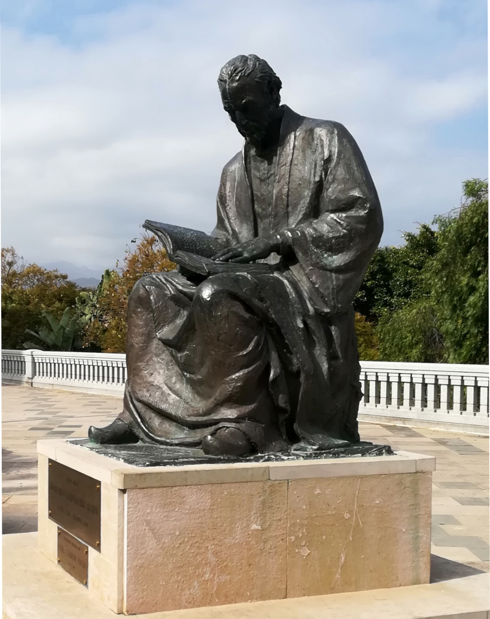 Josef ben Yehudah ibn Aknin. Ceuta. España.